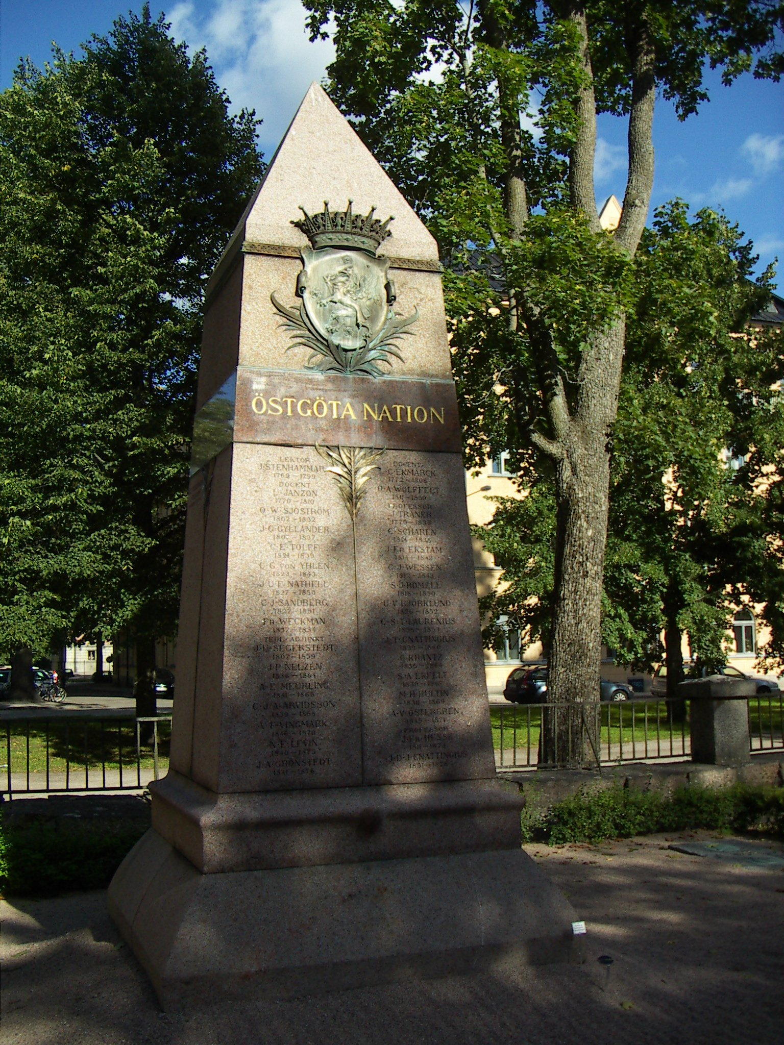 Östgöta nations grav på gamla kyrkogården i Uppsala.